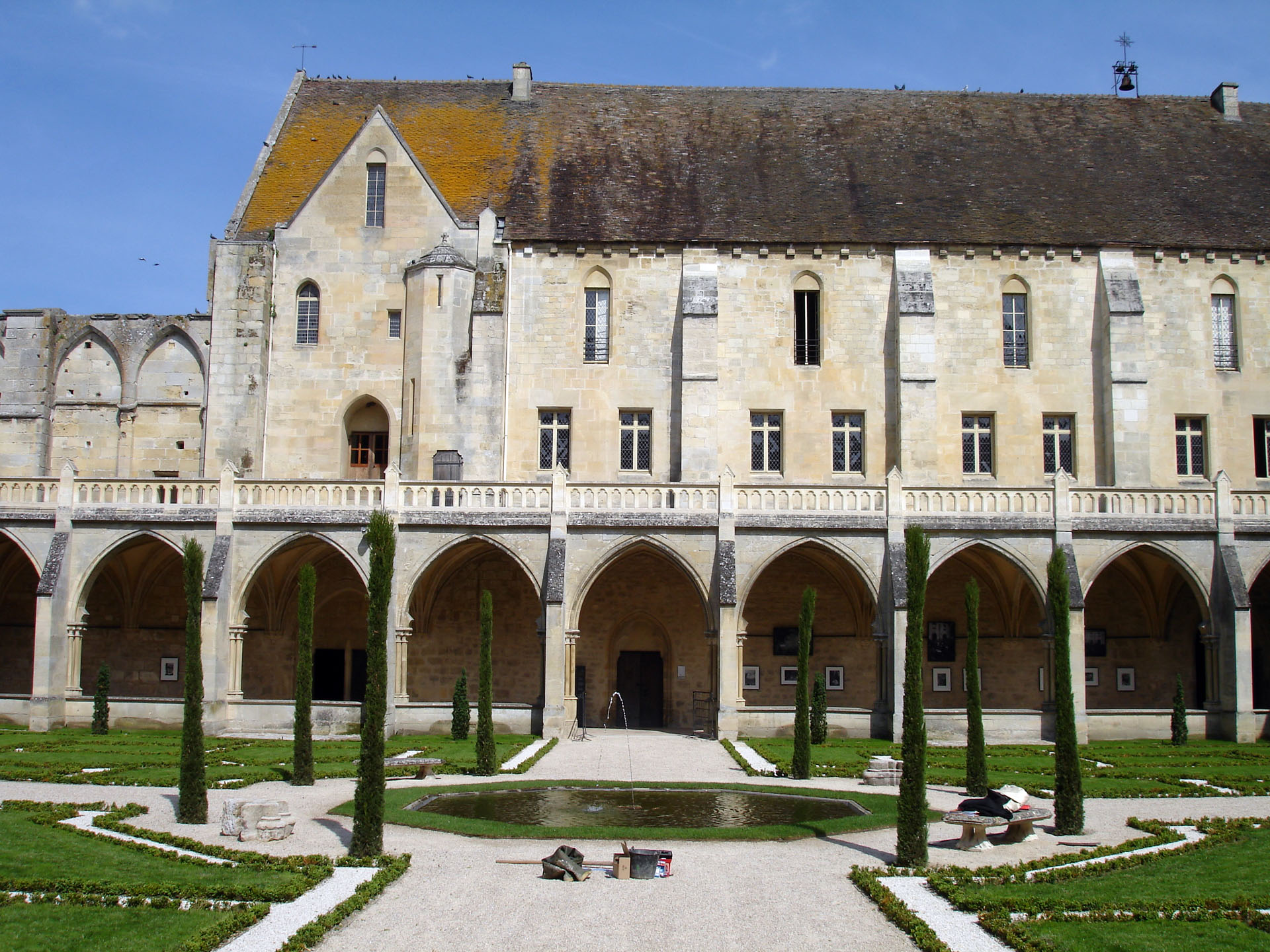 Le cloître et le bâtiment des moines de l'abbaye de Royaumont, Val-d'Oise, France.